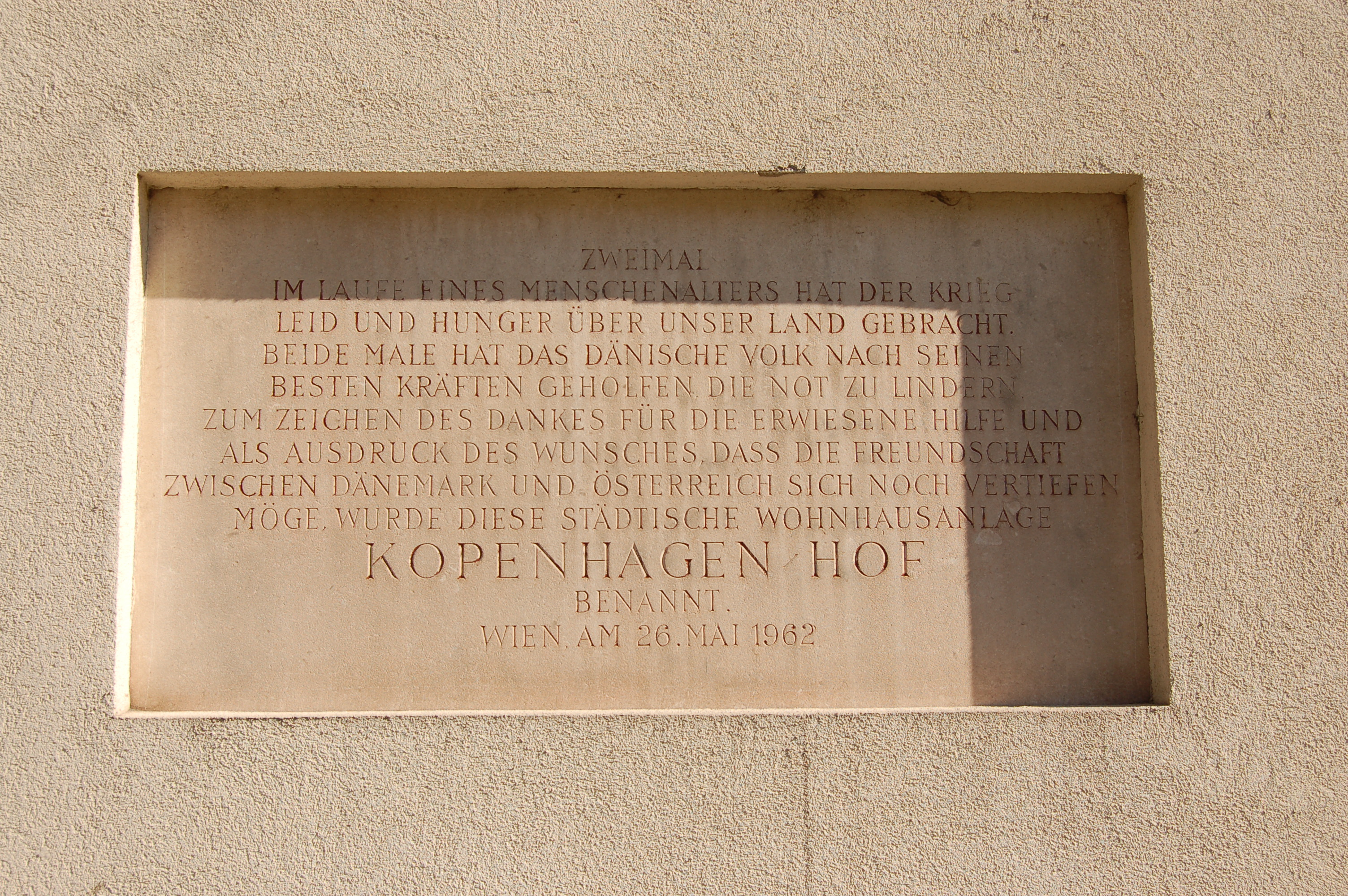 Gedenktafel an der Außenseite des Kopenhagen-Hofes an der Billrothstraße